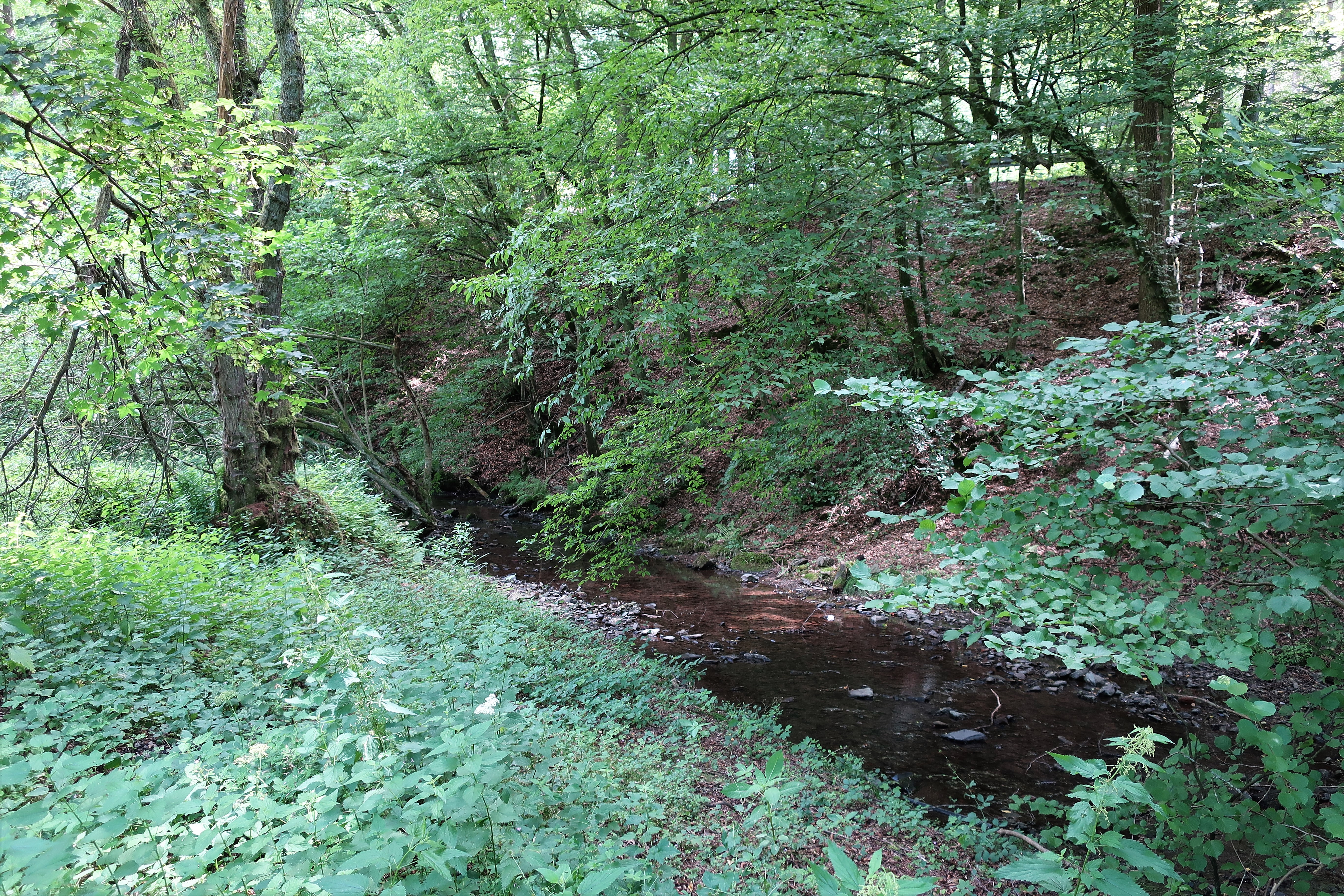 Geschützter Landschaftsbestandteil 1.4.2.90 „Sterbecker Aue“ in Hagen, östlich von Rummenohl zwischen Unter Langscheid und Rölveder Straße. Es handelt sich um Flächen mit Auwaldbeständen und Brachen entlang der Sterbecke sowie einer gehölzbestandenen Bachtalböschung.